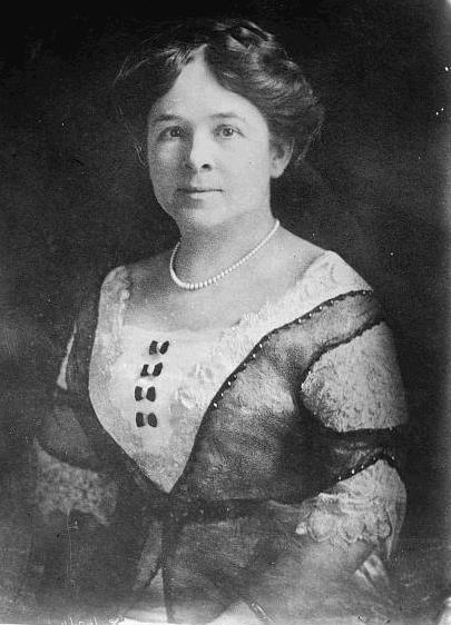 La Femme d'Henry Ford